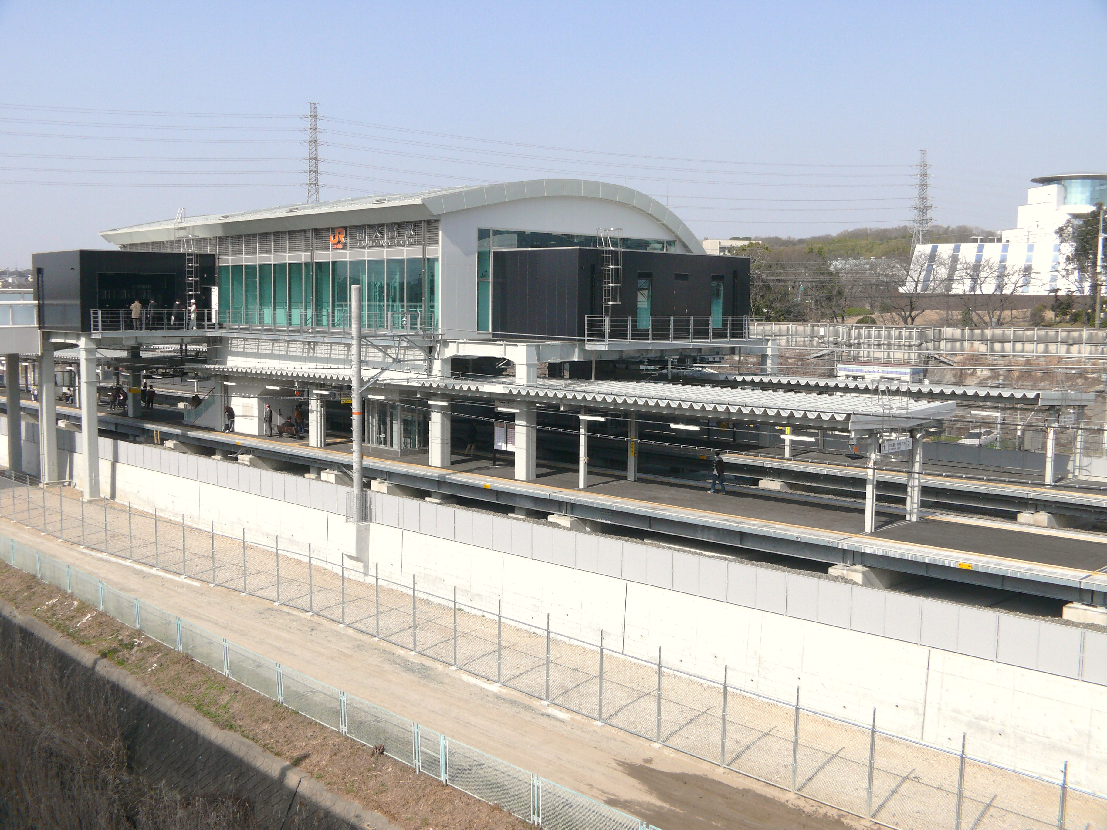 JR東海の東海道本線の南大高駅